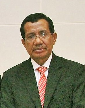 Egas da Costa Freitas, osttimoresischer Botschafter am Heiligen Stuhl erhält seine Akkreditierung von Präsident Taur Matan Ruak